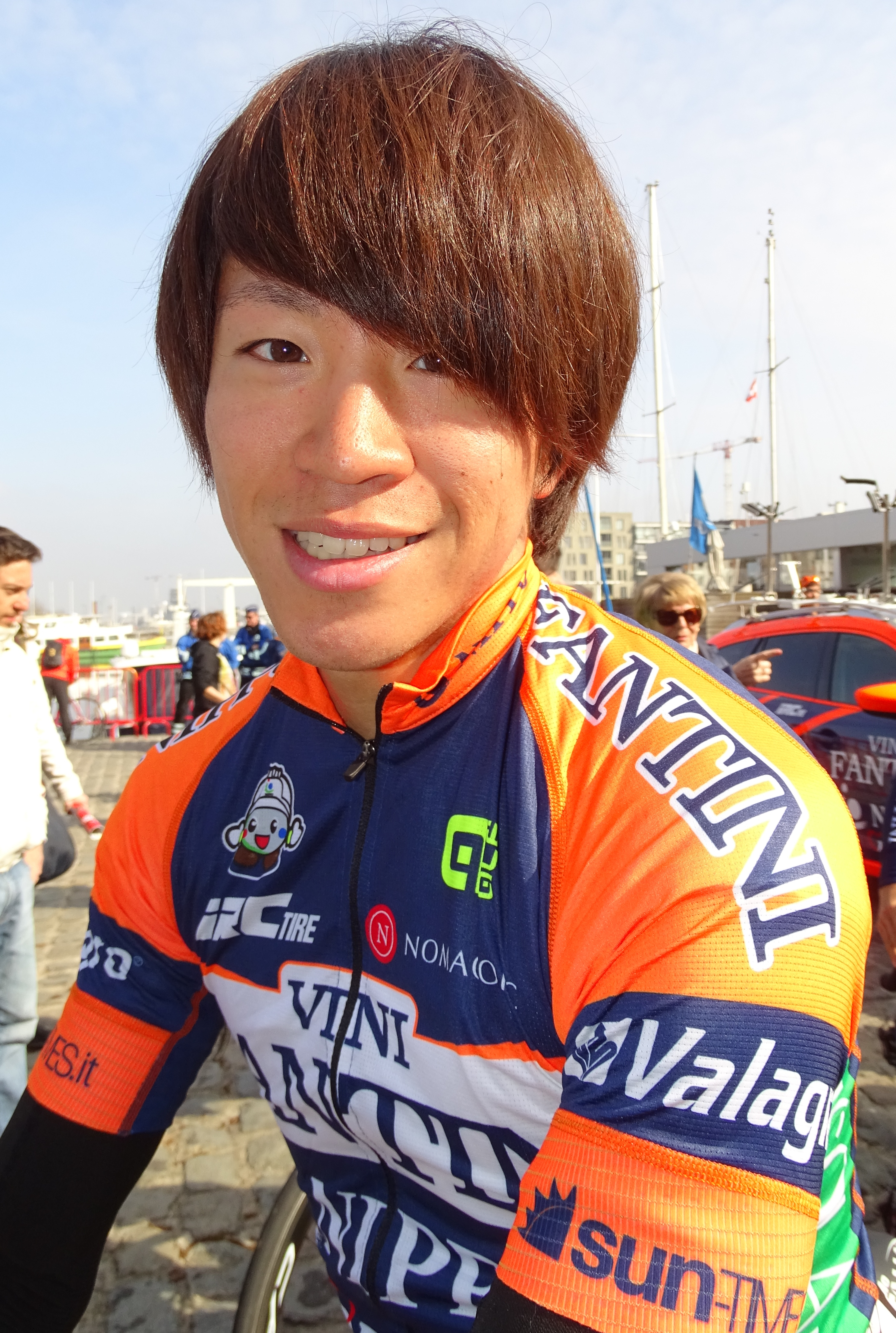 Reportage réalisé le mercredi 8 avril à l'occasion du départ du Grand Prix de l'Escaut 2015 à Anvers, Belgique.